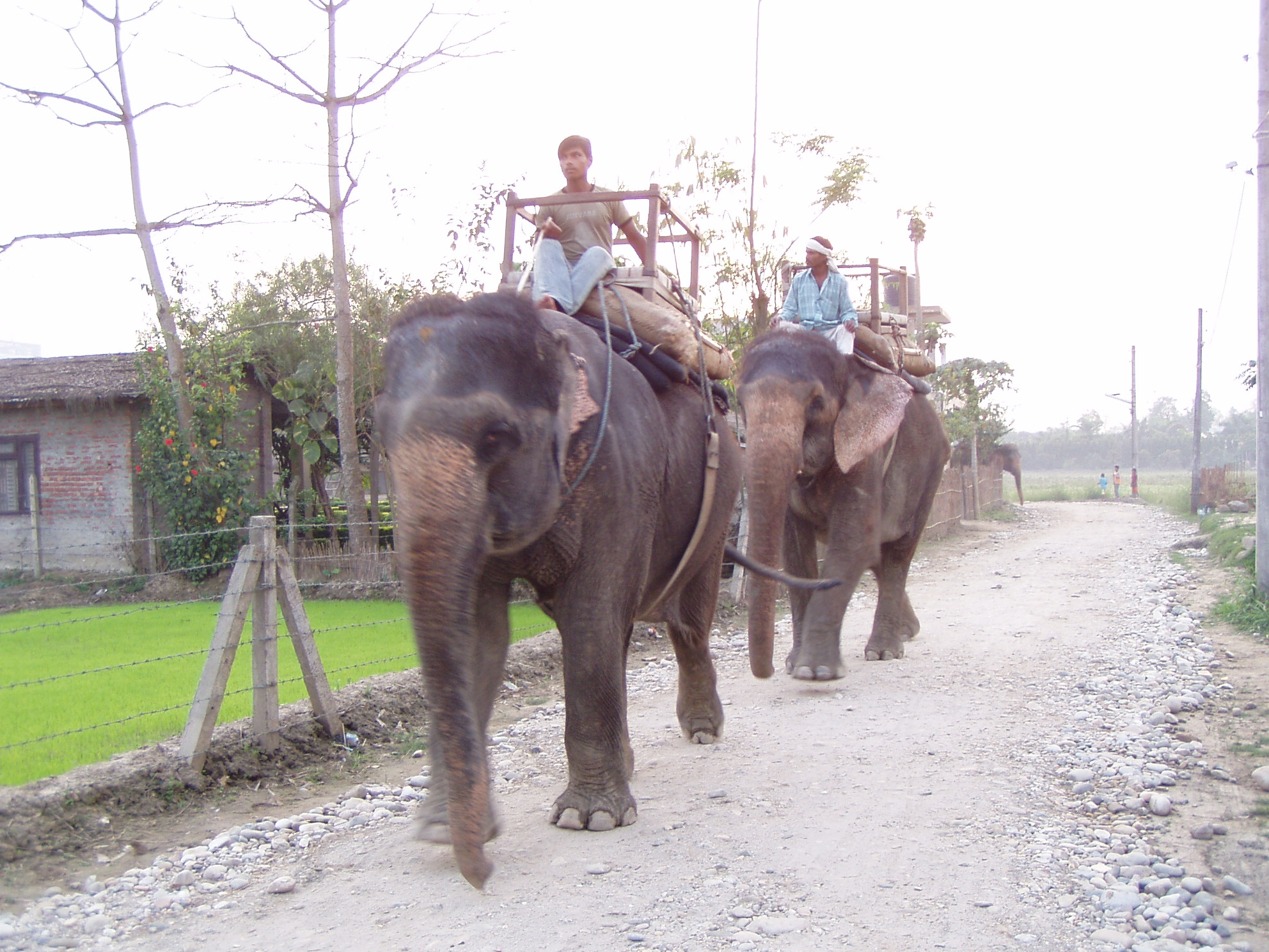 Elephant riding in Sauraha (Nepal)